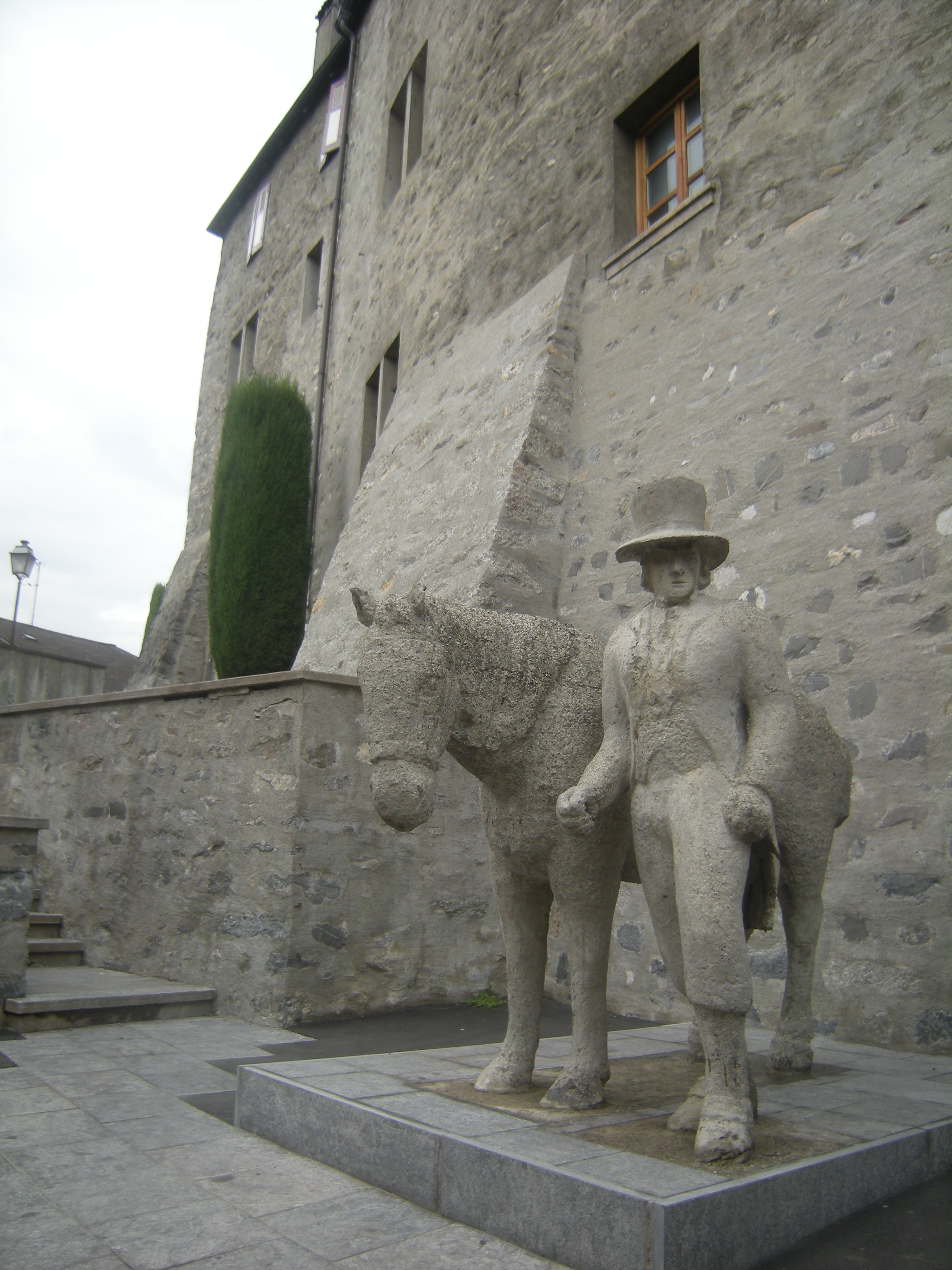 farinet au pied des remparts du château de monthey